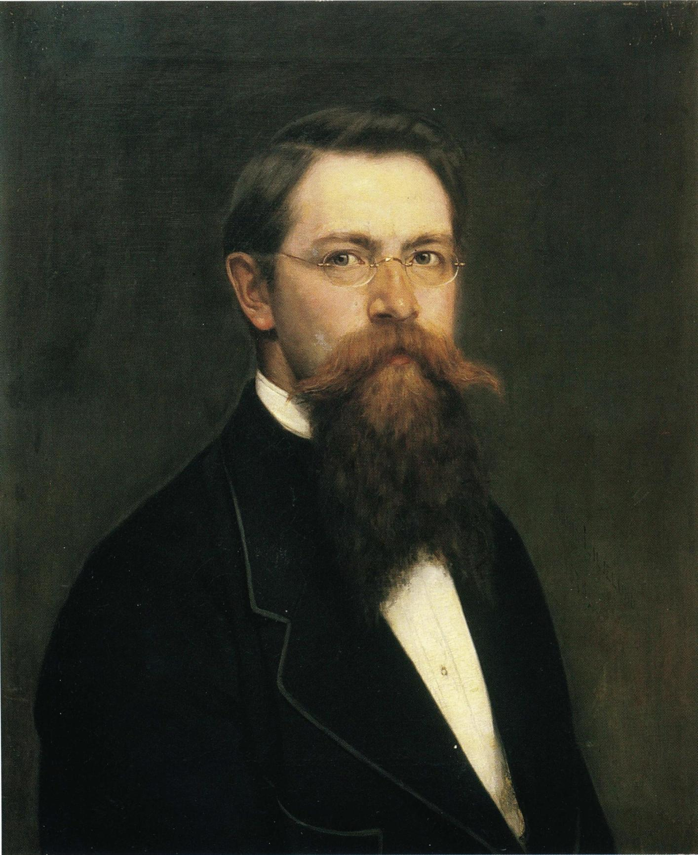 Taiteilija Arvid Liljelundin omakuva. Maalauksen omisti aikoinaan Viipurin taidemuseo, nykyään Hämeenlinnan taidemuseo.